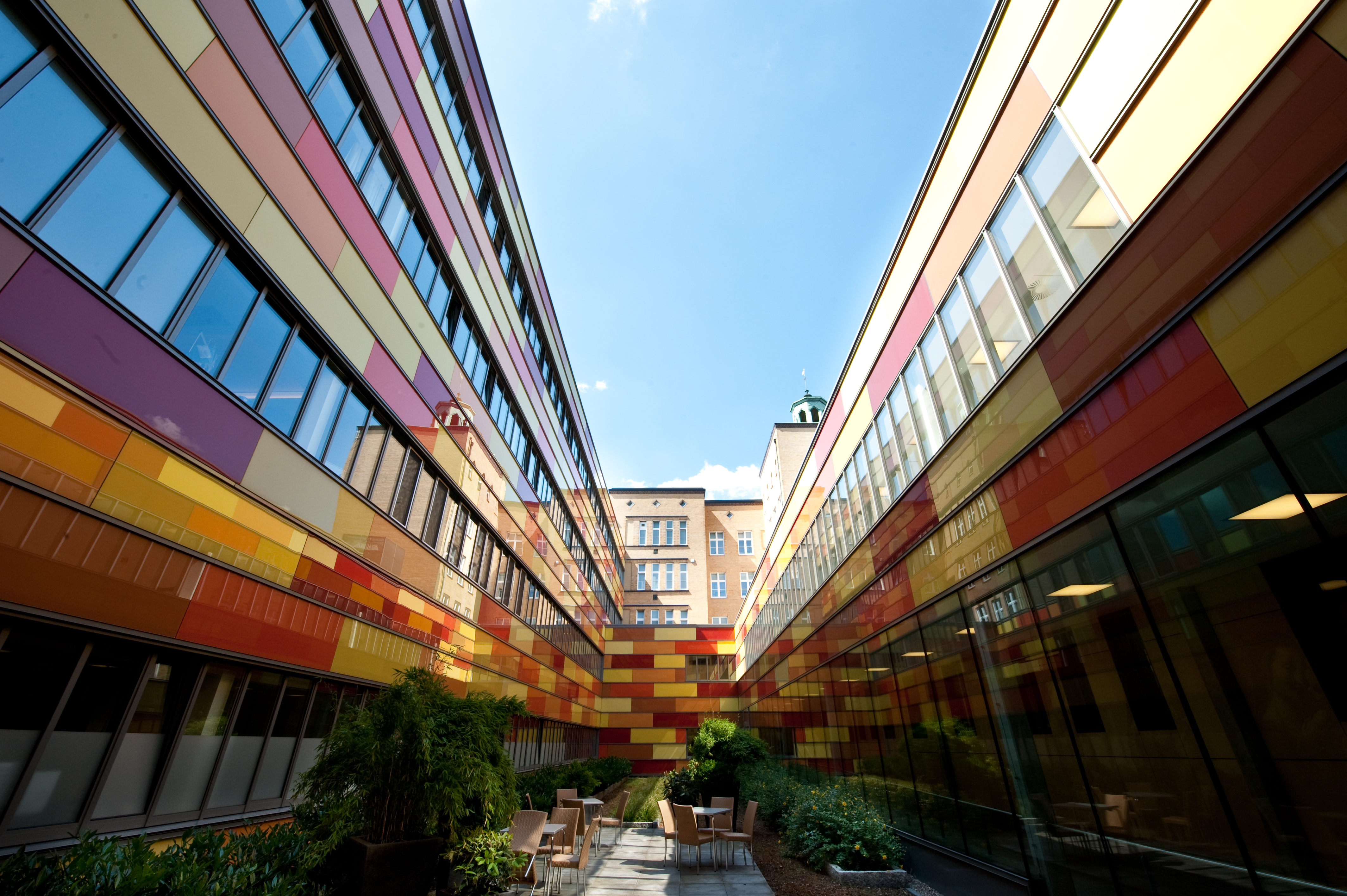 Interdiziplinäres Notfall- und Operationszentrum (Haus INO) am Marienkrankenhaus Hamburg